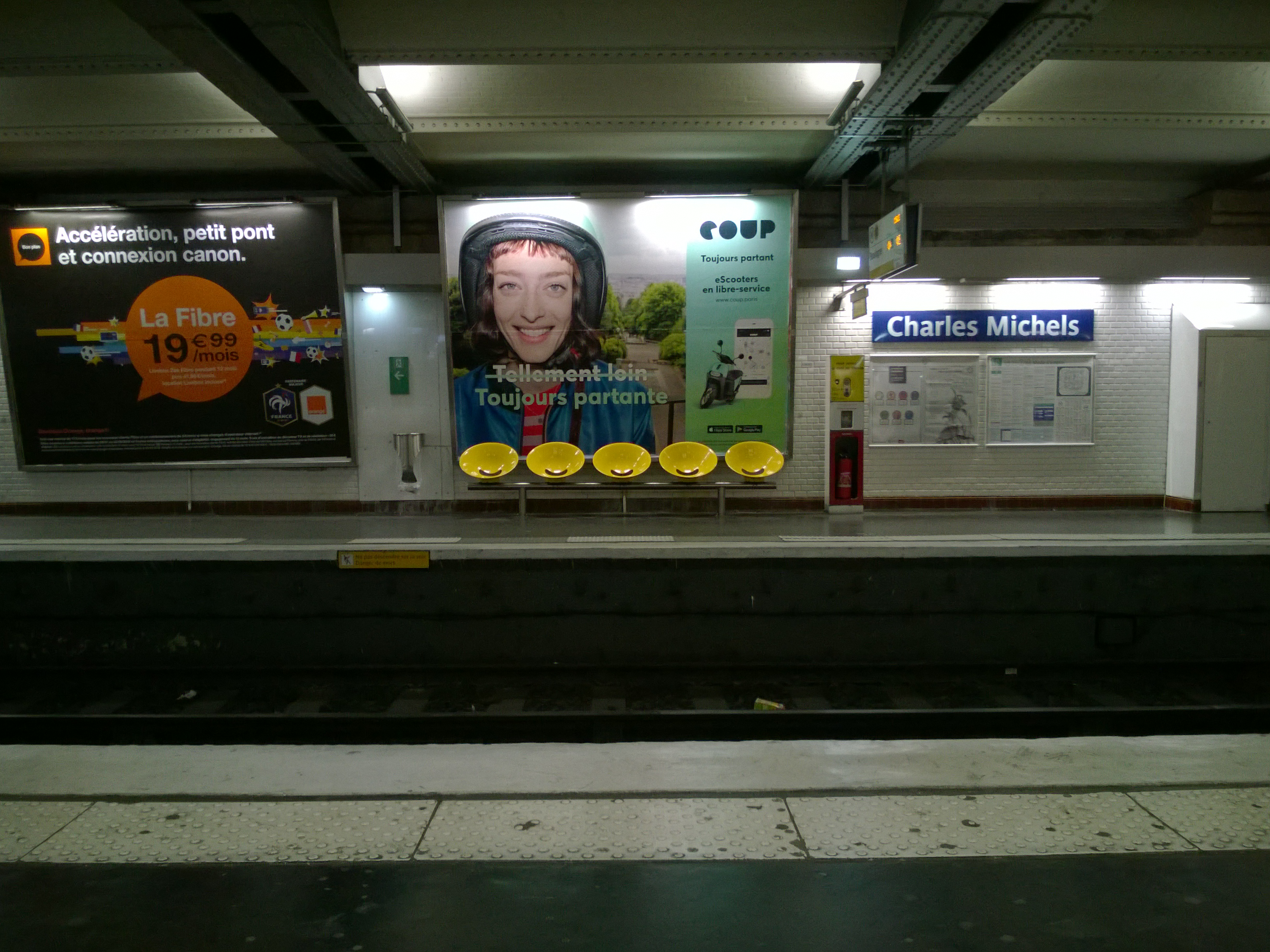 Station de métro Charles Michels, Paris 15è (département de Paris, France).Le quai d'en face est utilisé pour la direction de Boulogne.